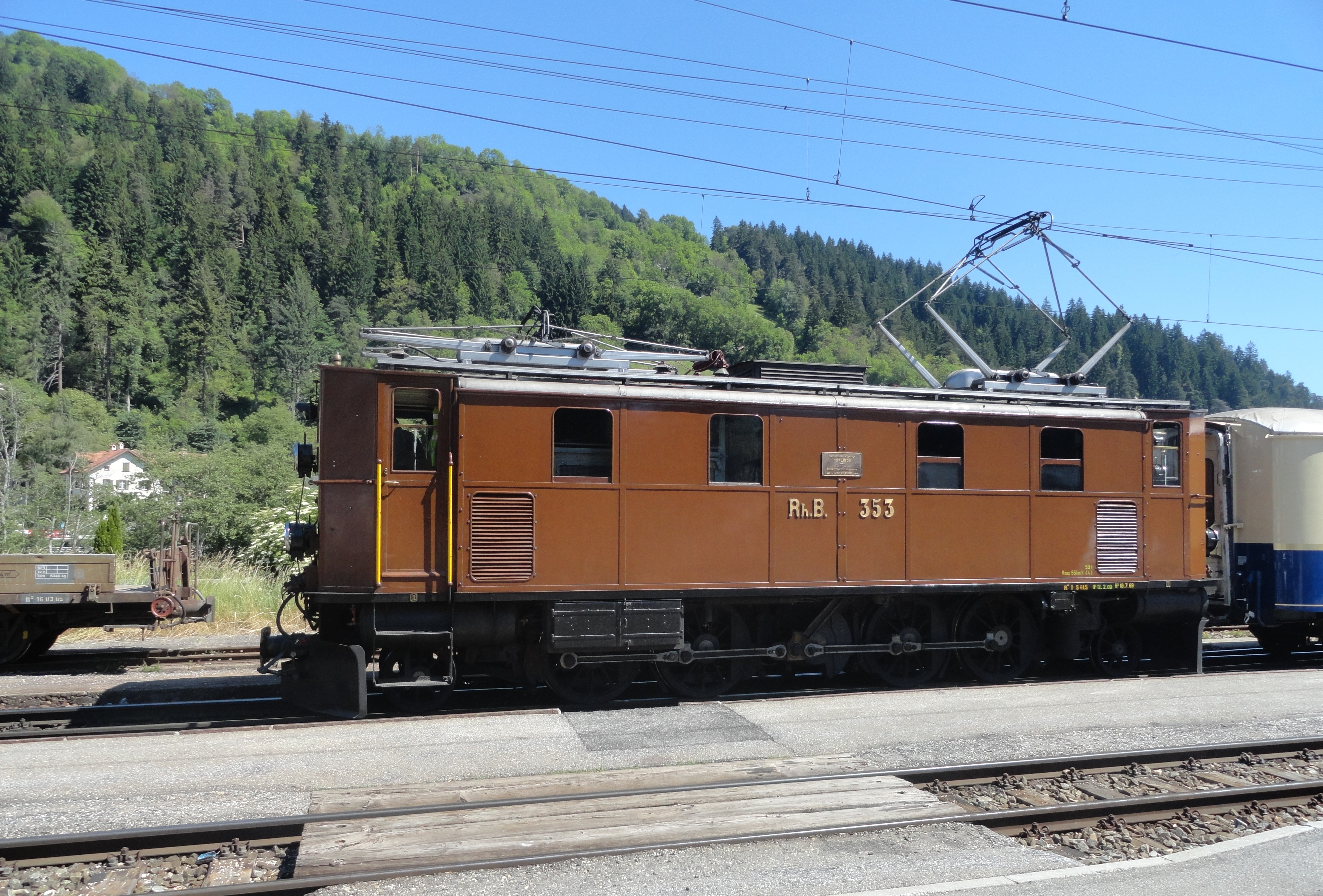 RhB Ge 4/6 vor dem Pullmannzug in Ilanz